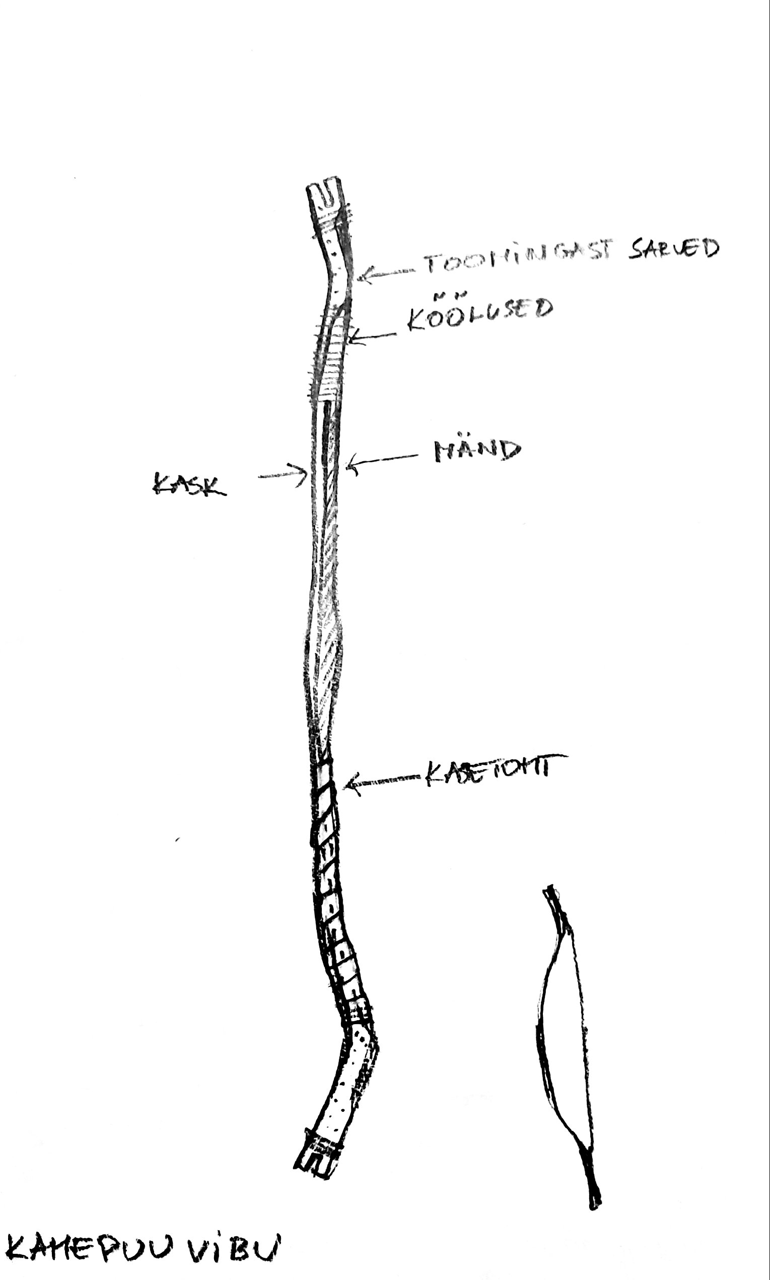 kahepuu vibu koosneb kasest (nn kõhu osa) ja männist (sisekaare osa). Vibu otstes on sarved, mis tavaliselt valmistatud toomingast, kui kergest ja tugevast puust. Liimina on kasutatud kalaliimi ja liitekohad on tugevdatud kõõlustega. Niiskusisolatsioonina on kasutatud kase tohtu.